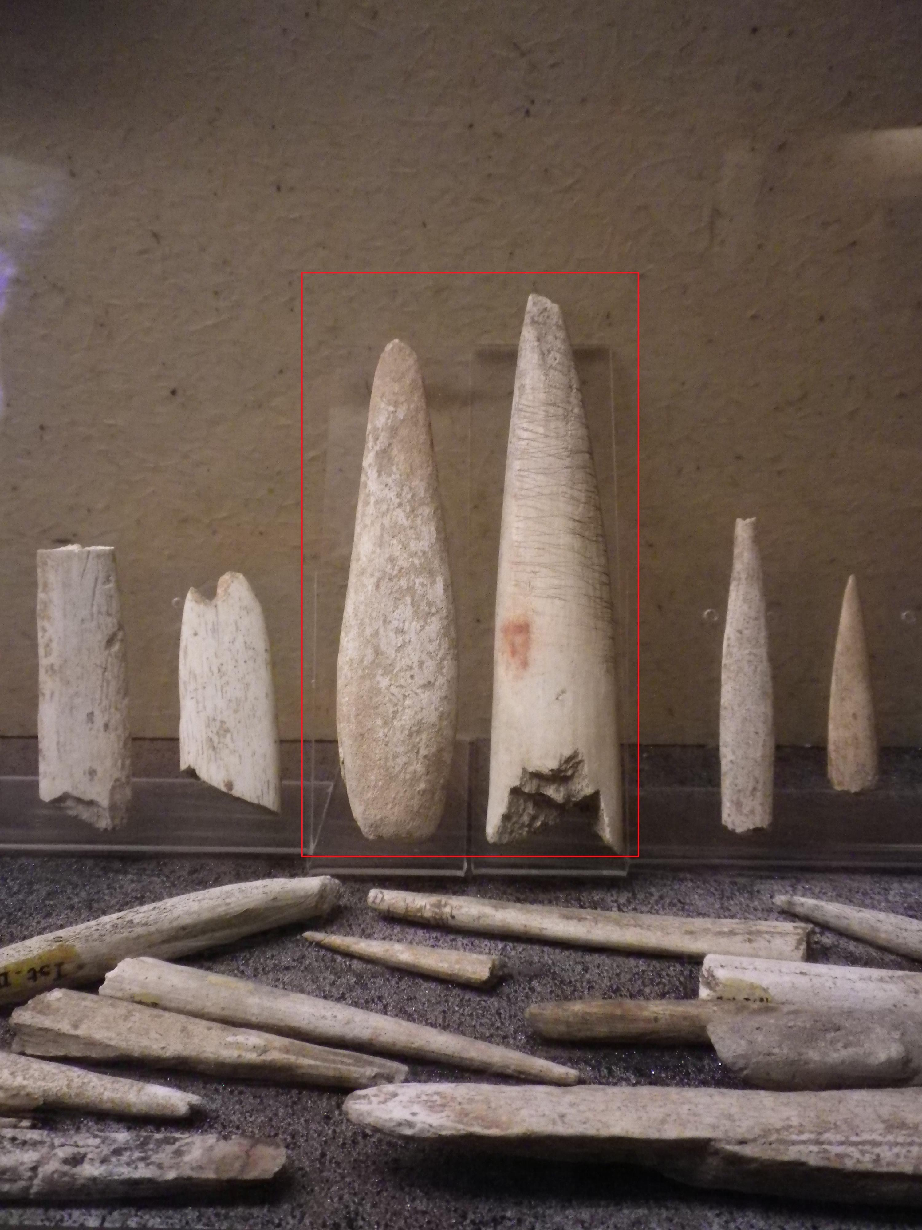 Geschossspitzen des Jungpaläolithikums. Der roten Rahmen zeigt zwei Isturitz-Spitzen. Pentax Optio H90